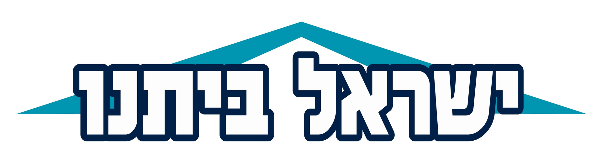 Emblem der israelischen Partei Jisra'el Beitenu (ישראל ביתנו)